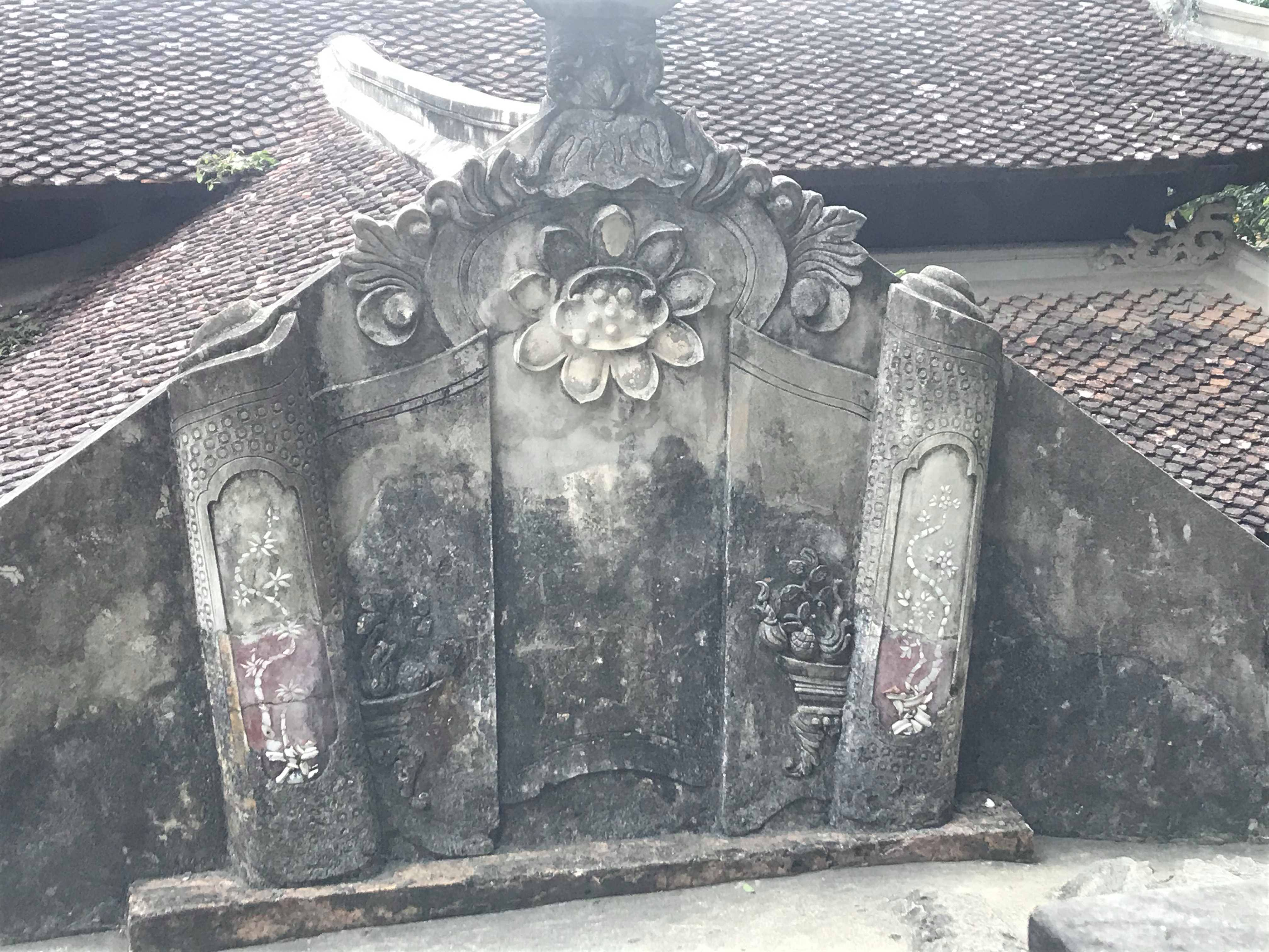 Hình chiếu chỉ sau chùa Hạ có điêu khắc hình hoa sen, lá. Đặc biệt hai bên có hình cây trúc rất đẹp.